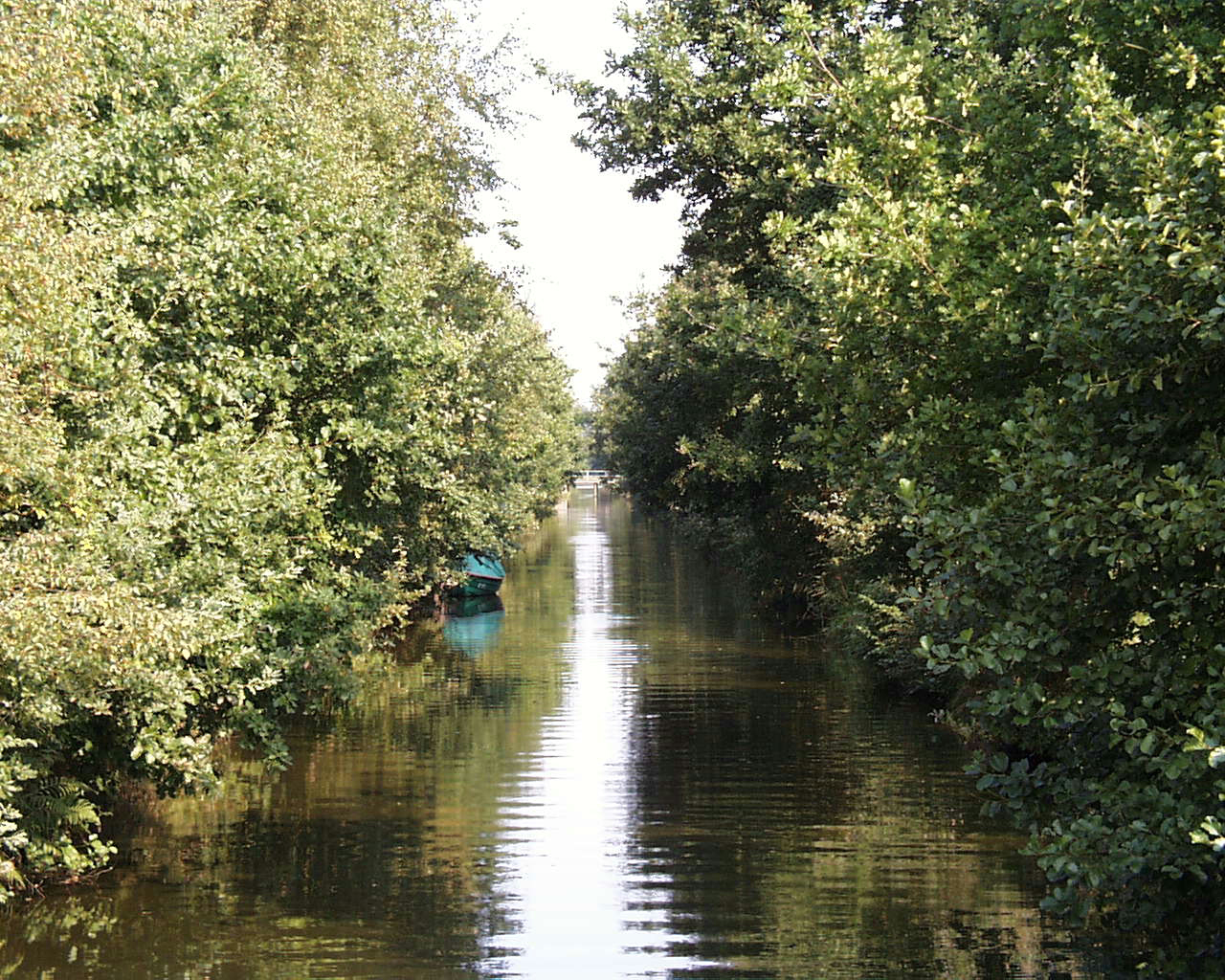 Der Neuhaus-Bülkauer Kanal auch "Opplerkanal" genannt